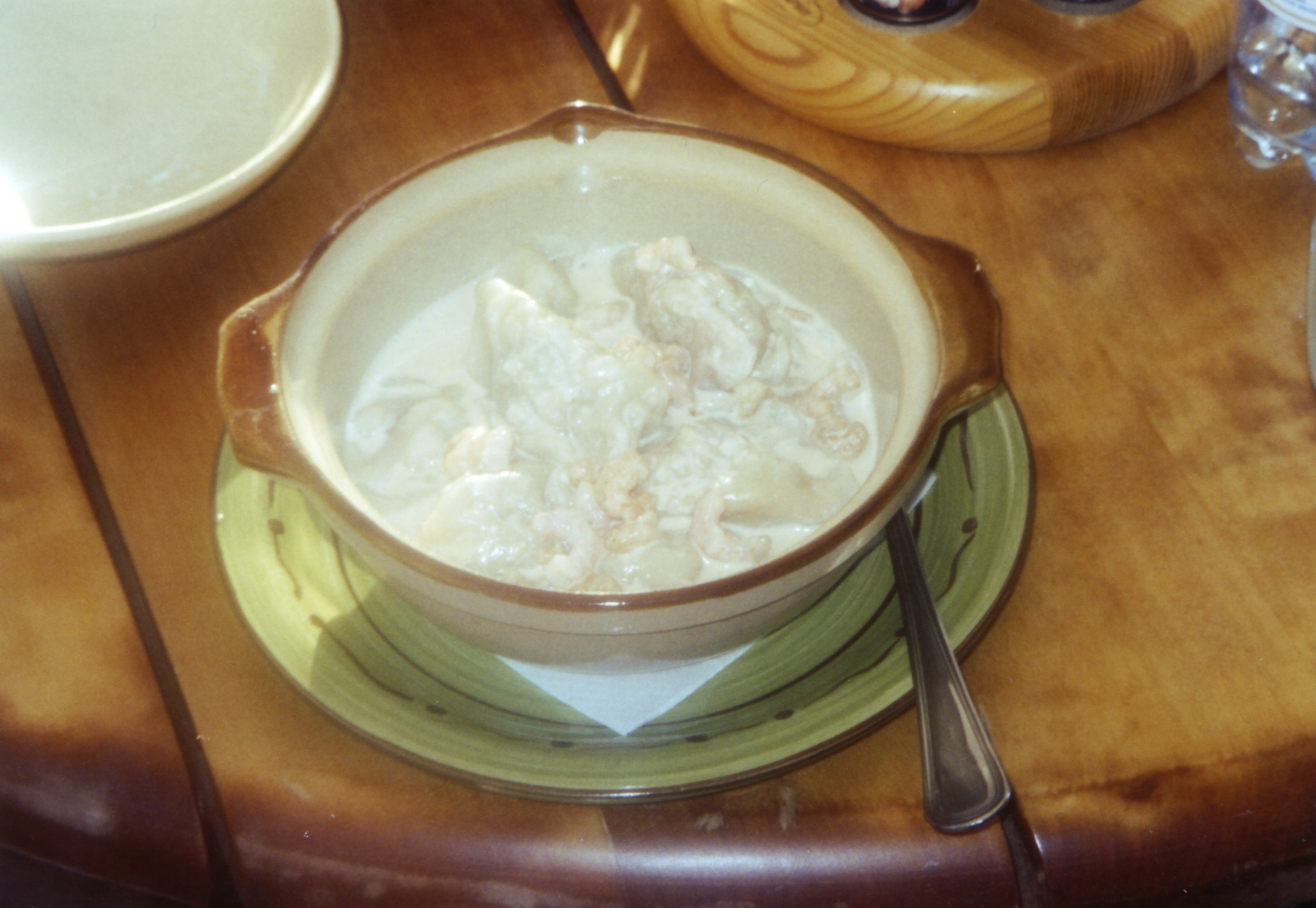 pelmenoj (ruse пельмени, "pelmeni"), do farĉitaj pastovolvaĵoj, en rusa restoracio en la litovia urbo Palanga